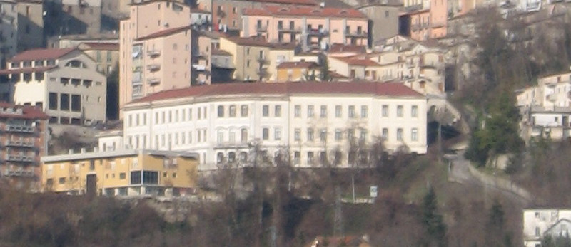 Scuola elementare Silvio Spaventa Filippi (Avigliano)